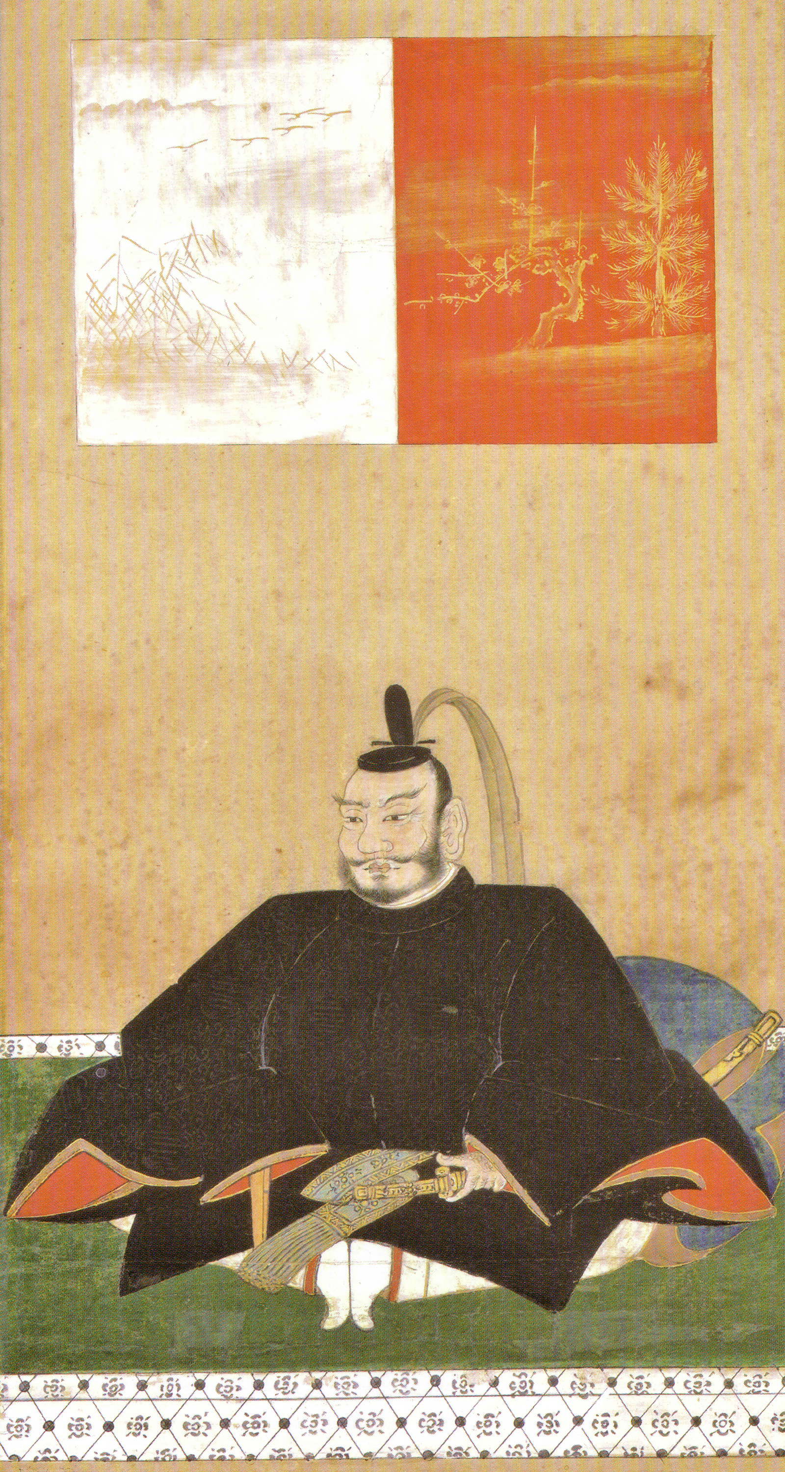 相良義陽像